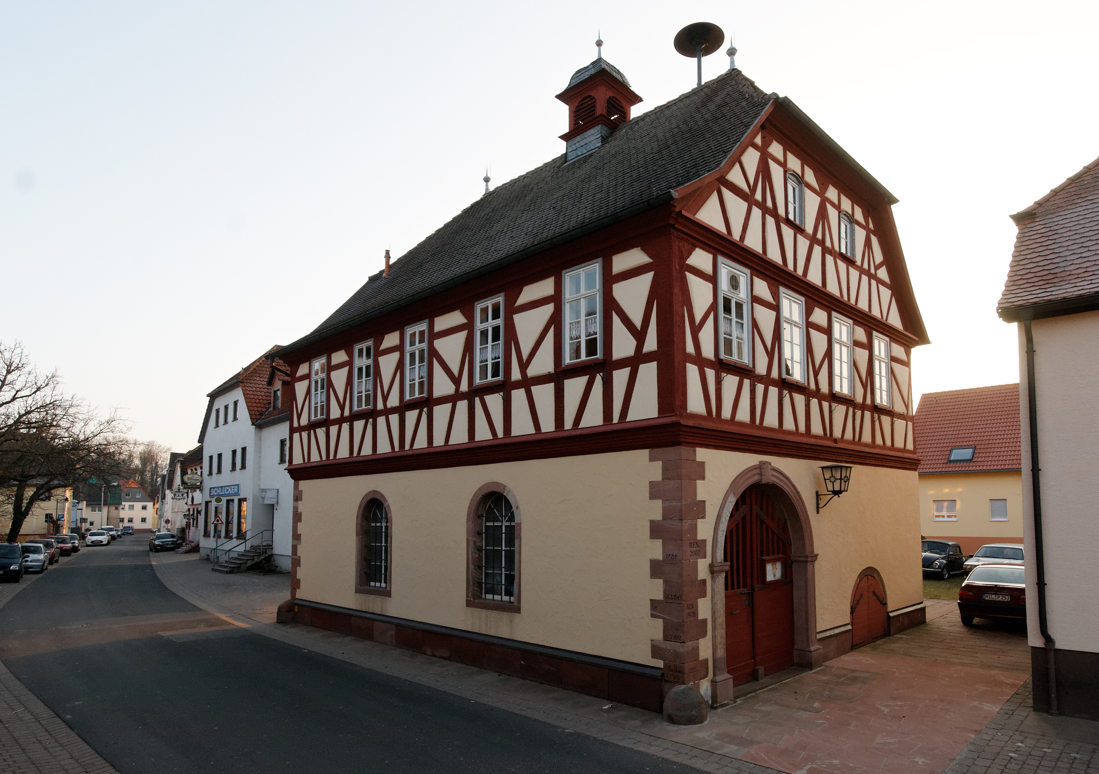 Ehemaliges Rathaus von Kleinheubach (Bayern) mit Blick in die Marktstraße